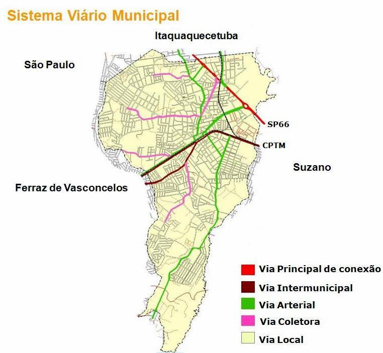 Sistema viario municipal de poá-sp